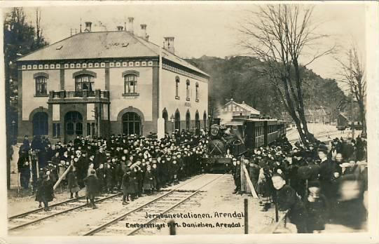 Scan av postkort fra 1908, åpningen av Arendal jernbanestasjon